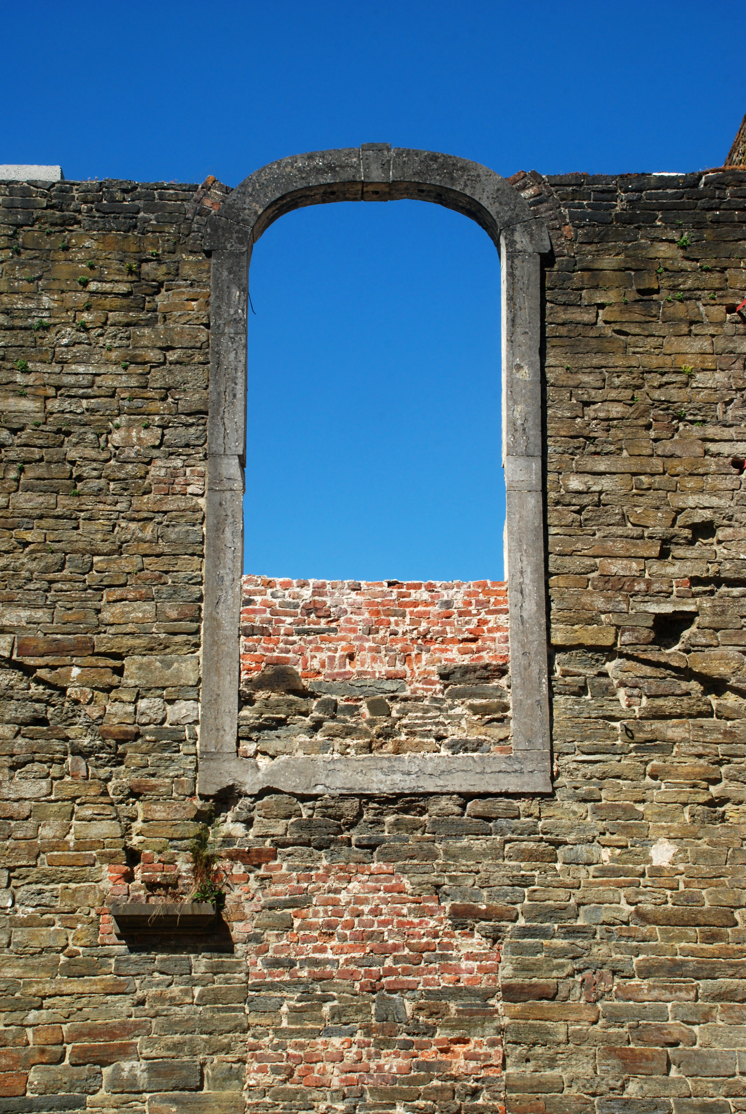 Belgique - Brabant wallon - Villers-la-Ville - ancienne pharmacie de l'Abbaye